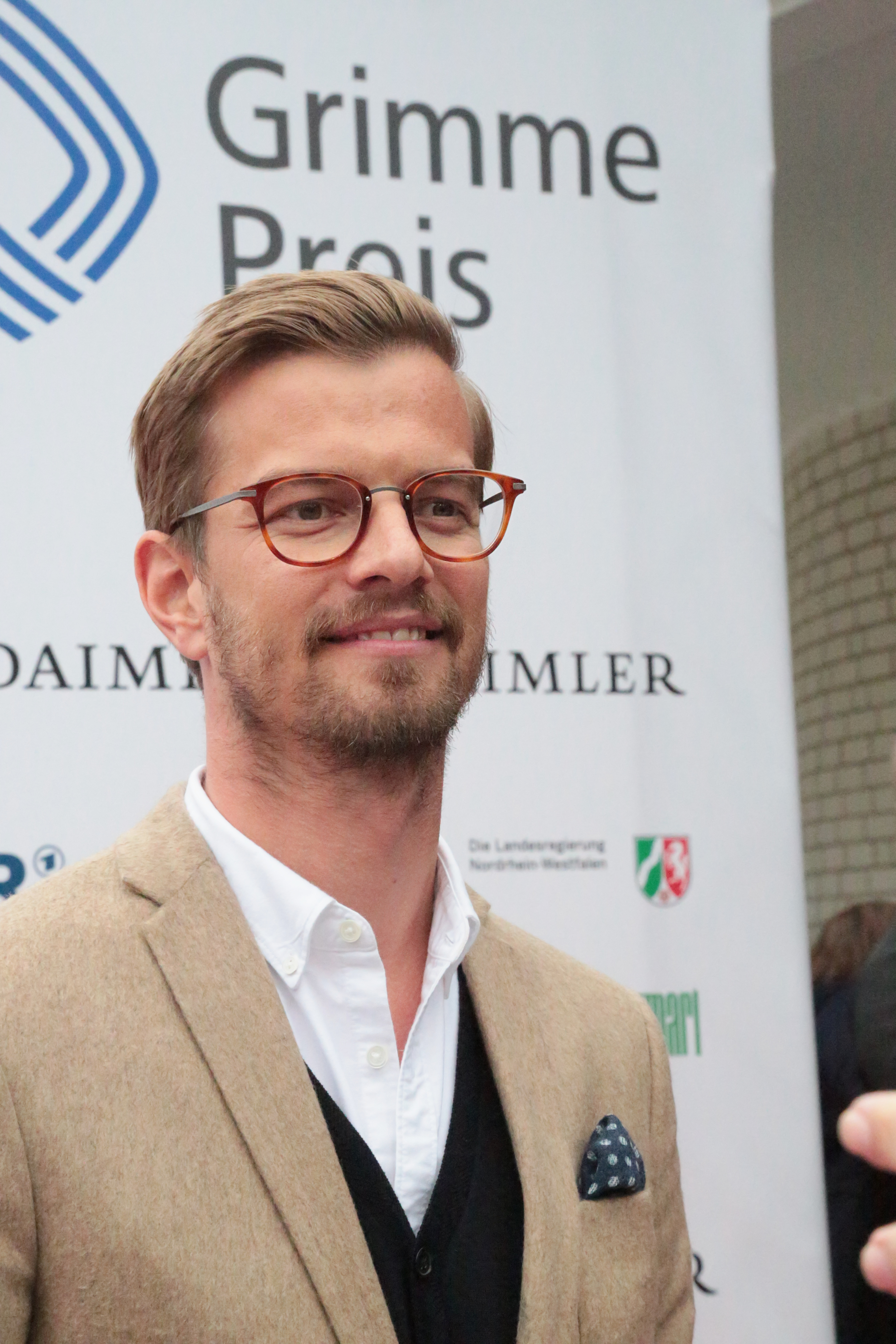 Joko Winterscheidt beim Grimme-Preis 2018, am 13.04.2018 in Marl.